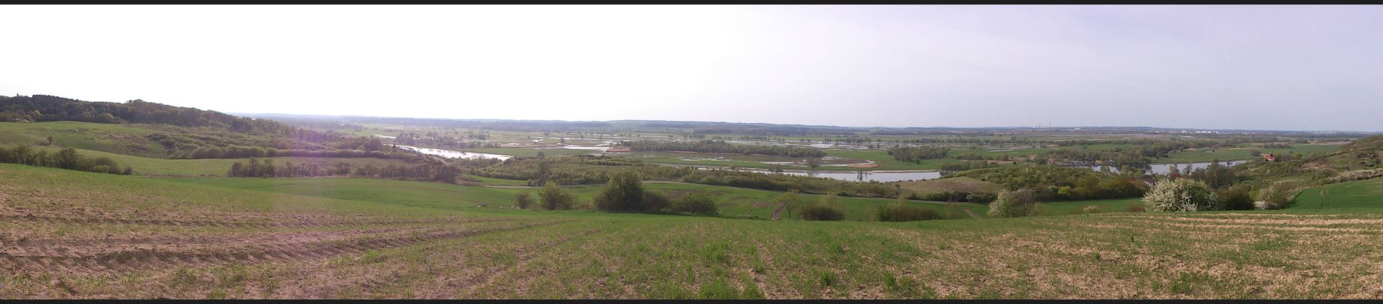 Okolice Zatoni Dolnej - panorama Doliny Dolnej Odry